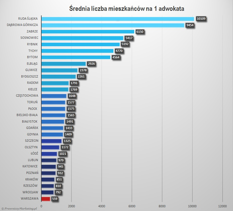 Diagram prezentuje średnią liczbę mieszkańców w największych polskich miastach przypadającą na 1 adwokata w oparciu o dane z Krajowego Rejestru Adwokatów i Aplikantów Adwokackich oraz dane Głównego Urzędu Statystycznego na dzień 04.05.2015 r.